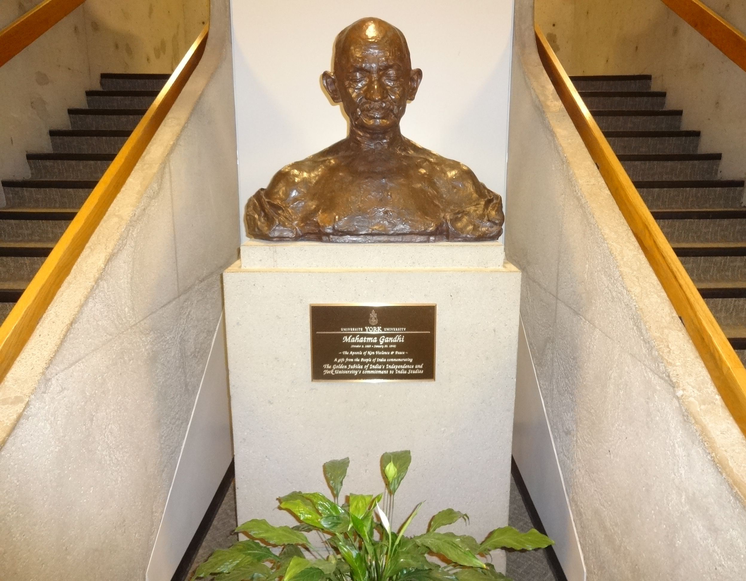 Estátua de Mahatma Gandhi na York University.